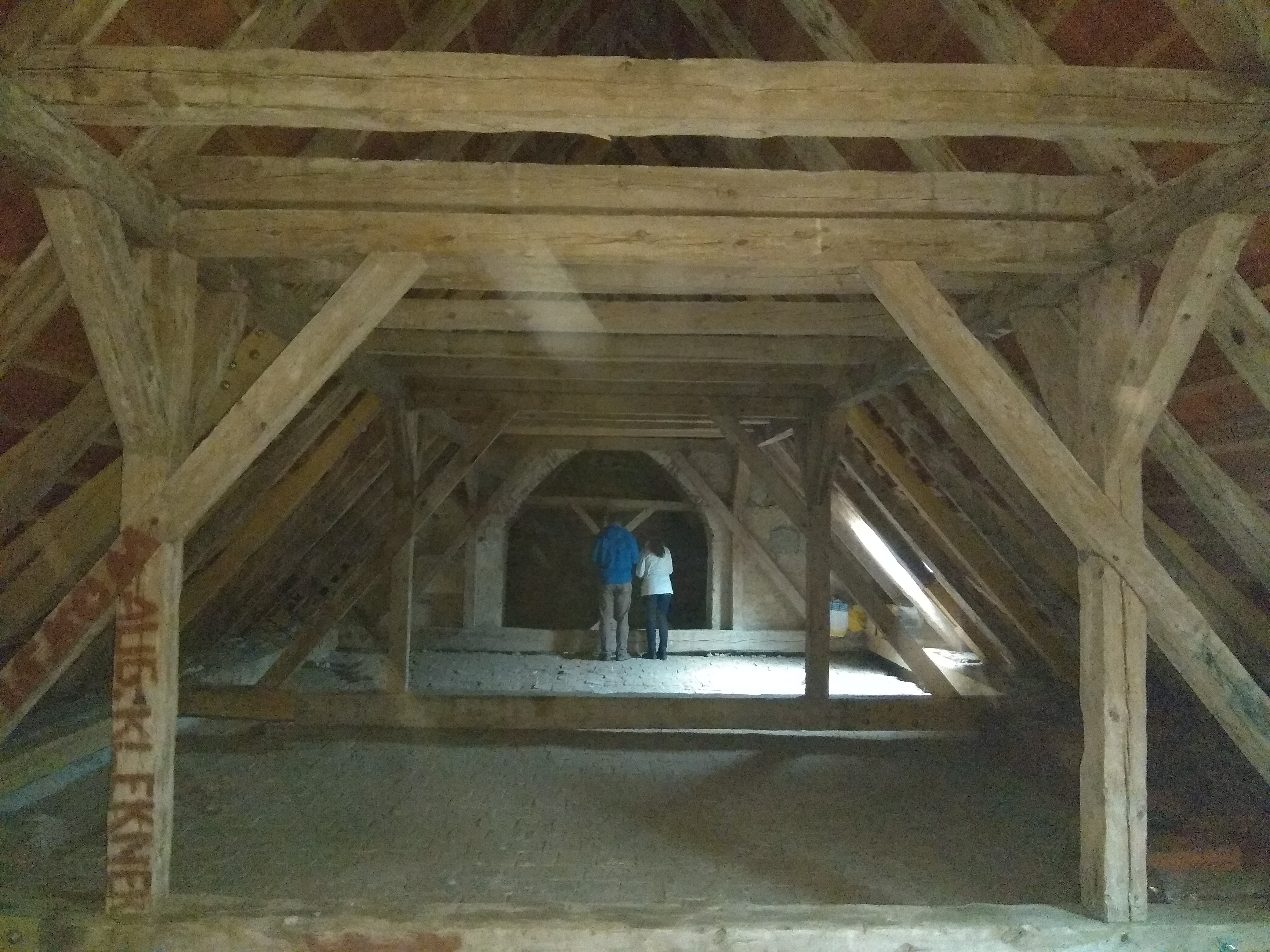 Olešky kostel - podkroví